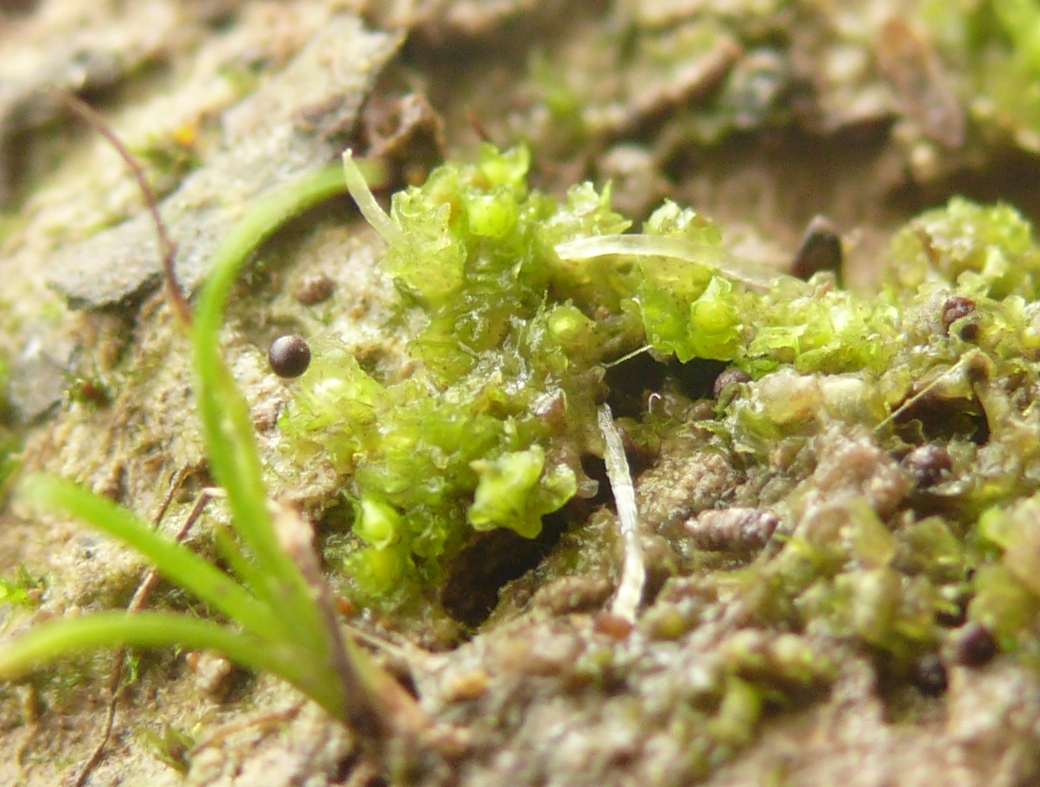 Fossombronia wondraczekii, Schwäbisch-Fränkische Waldberge